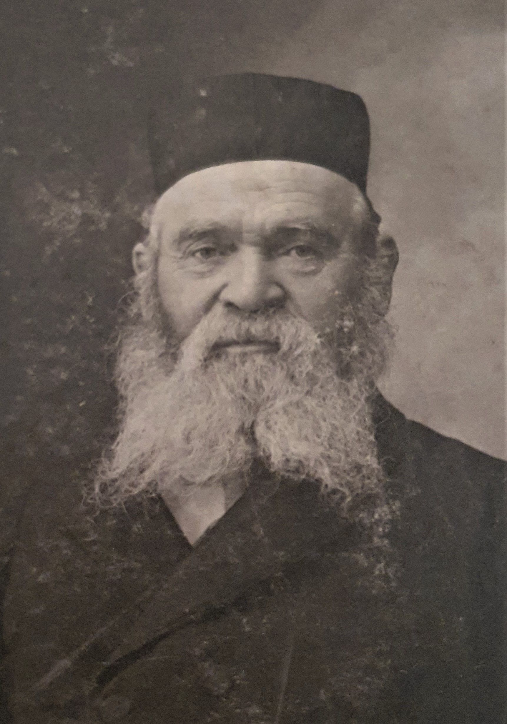 צולם בנובי דבור, פולין, 1913